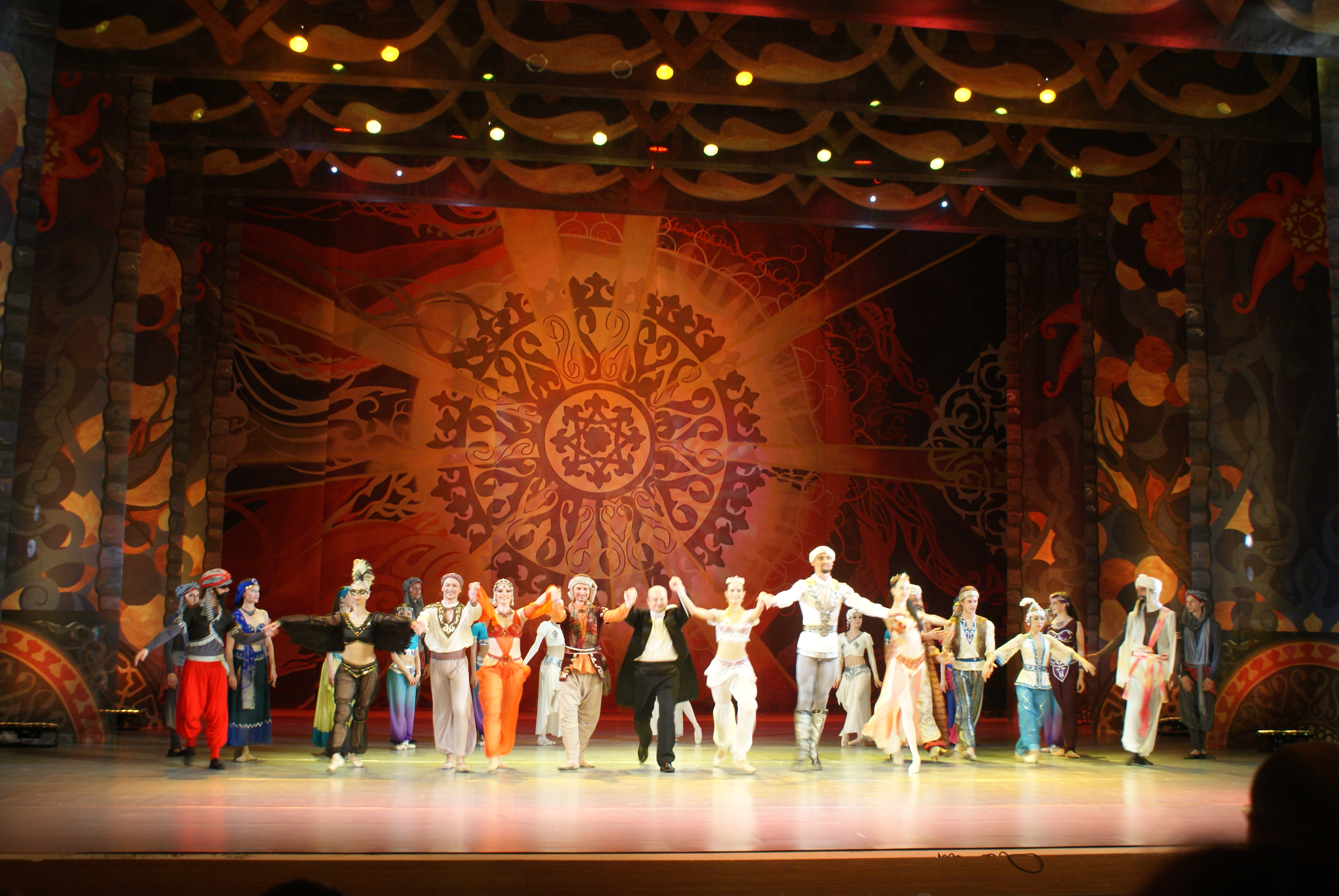 Тысяча і адна ноч у Беларускім дзяржаўным акадэмічным музычным тэатры